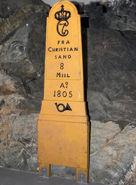 Fra Aust-Agder-Museets utstillinger. Milepæl fra Vestlandske Hovedvei. Tilhører Aust-Agder kulturhistoriske senter